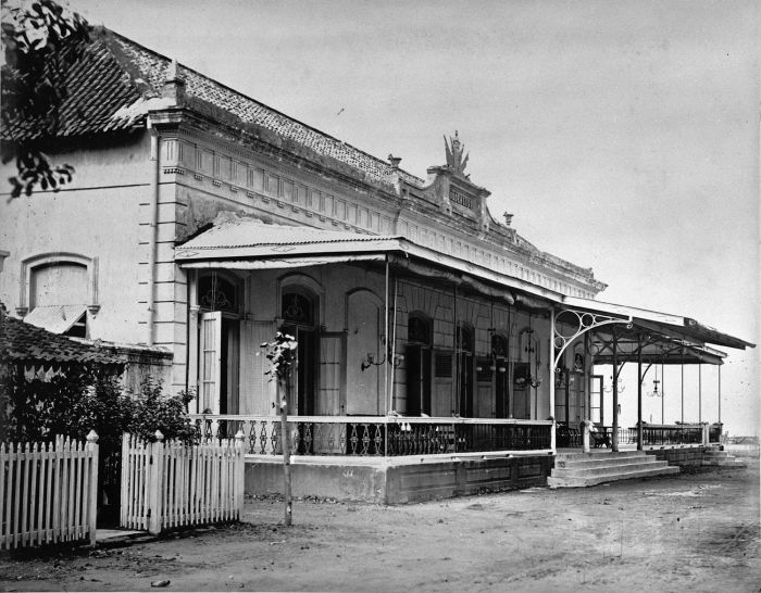 Foto. De marinesociëteit "Modderlust", Soerabaja